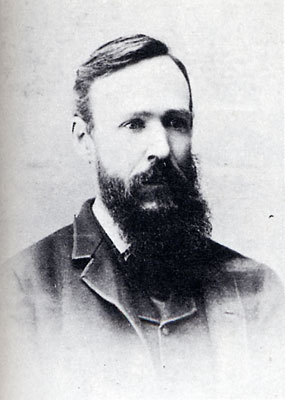 ドワイト・ホイットニー・ラーネッド (1848-1943)